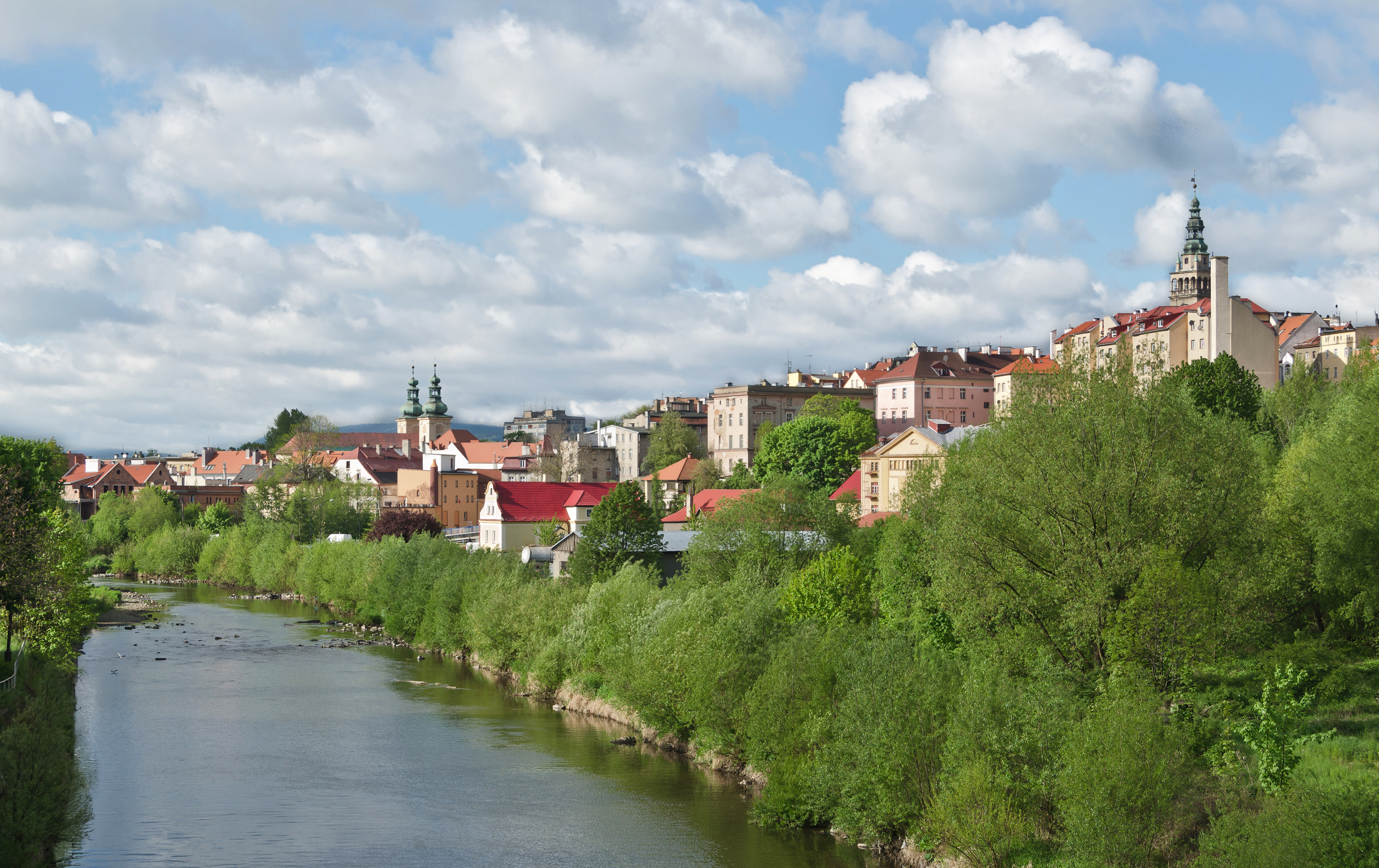 Kłodzko, historyczny układ urbanistyczny - ośrodek historyczny miasta Kłodzko z zachowanymi niekompletnie miejskimi murami obronnymi wraz ze średniowiecznym mostem i wyspą Piasek